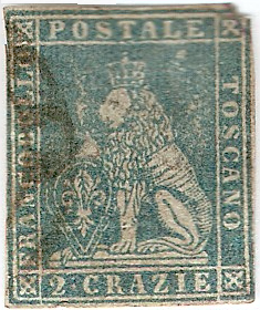 Timbre du Grand-Duché de Toscane (Italie) de 1851.